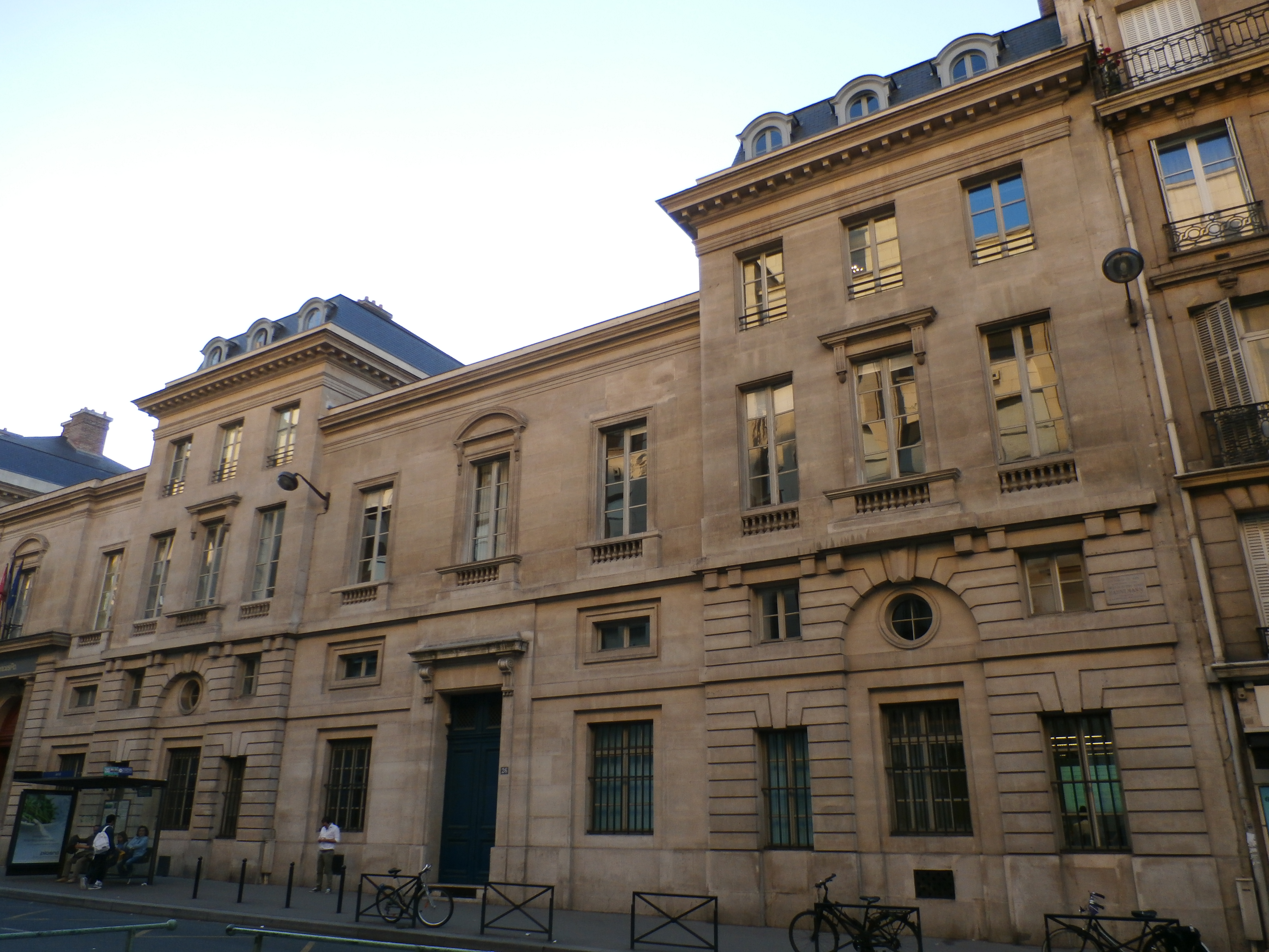 École nationale des Ponts et Chaussées(ancien hôtel de Fleury) (Inscrit) .